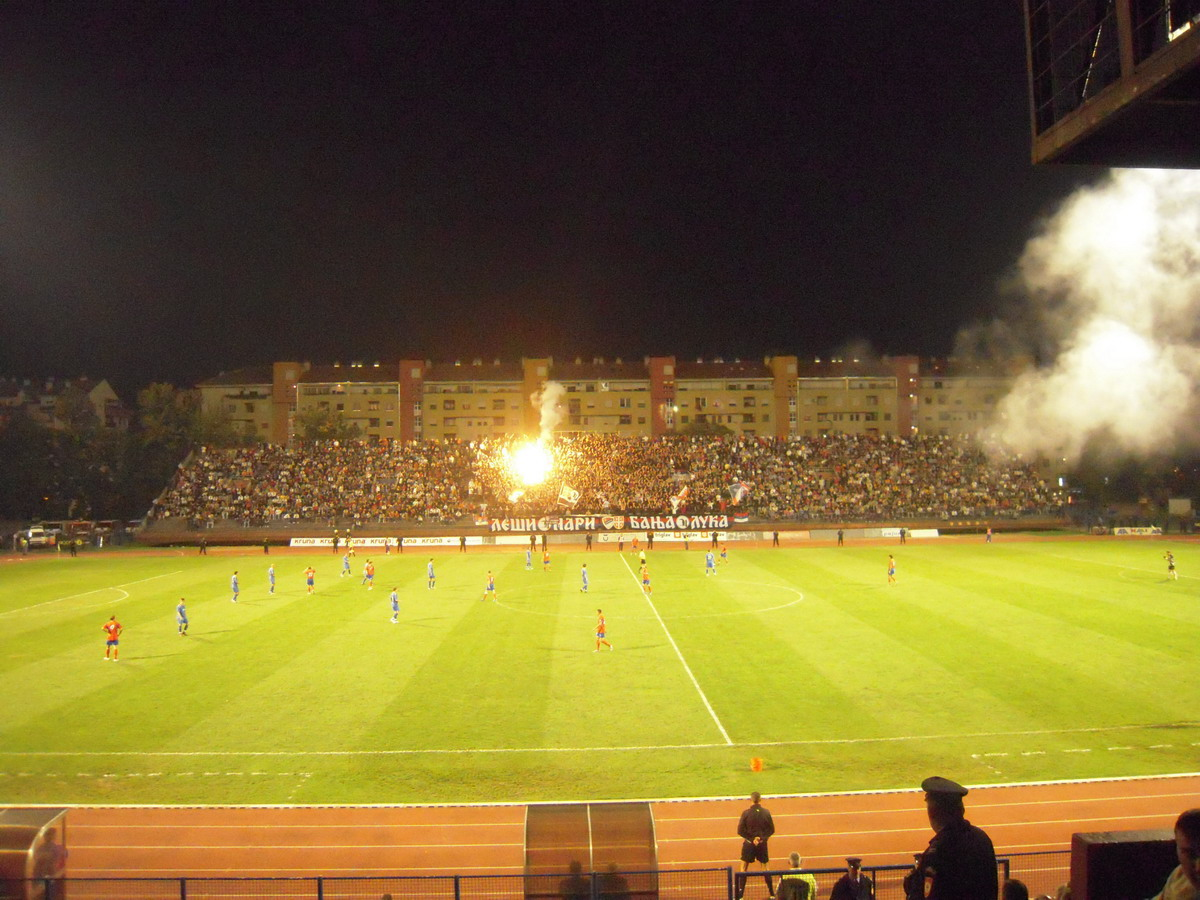 Borac-Željezničar,_2009._godine